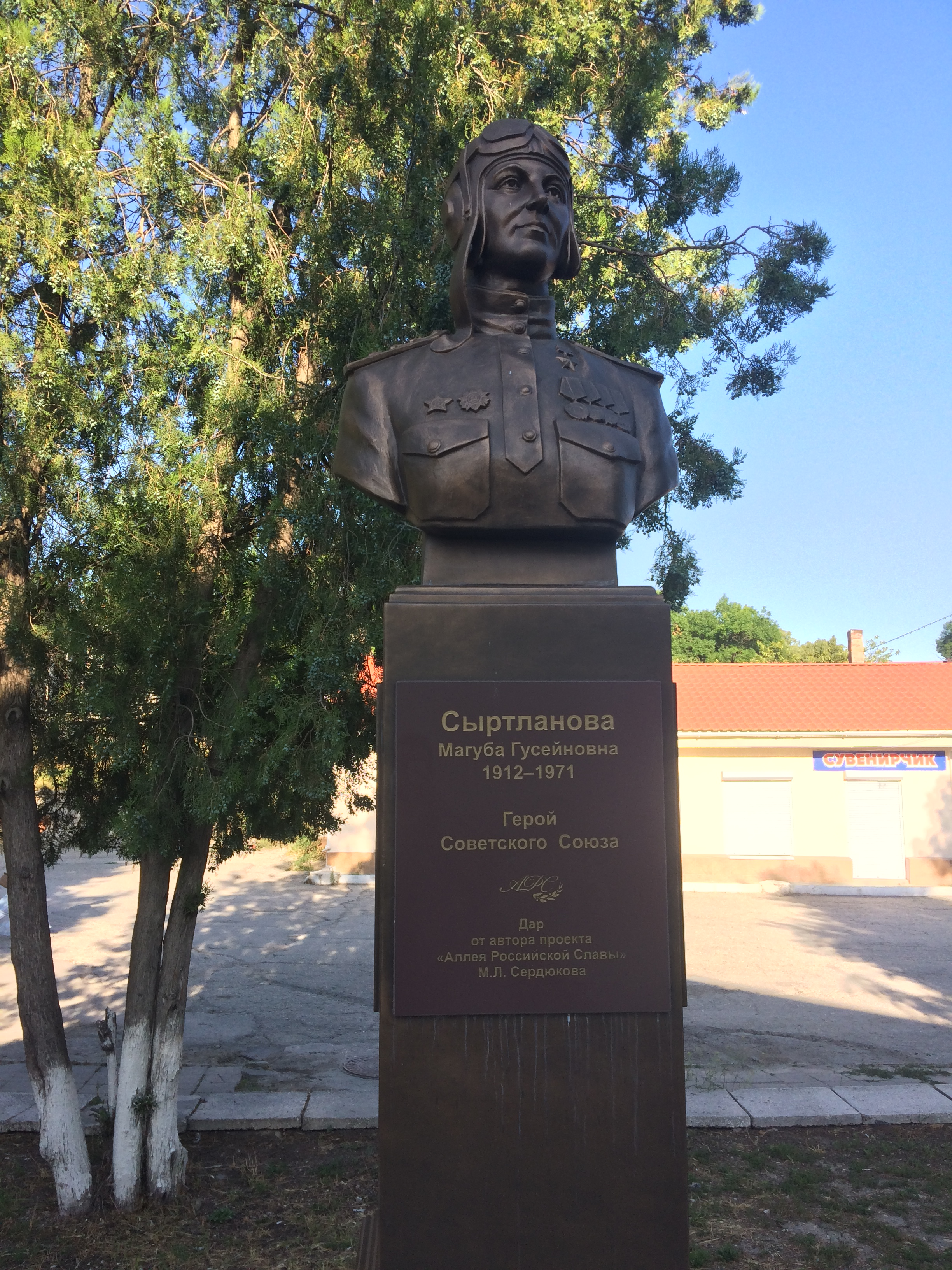 Памятник Магубе Сыртлановой в Белогорске (2018)